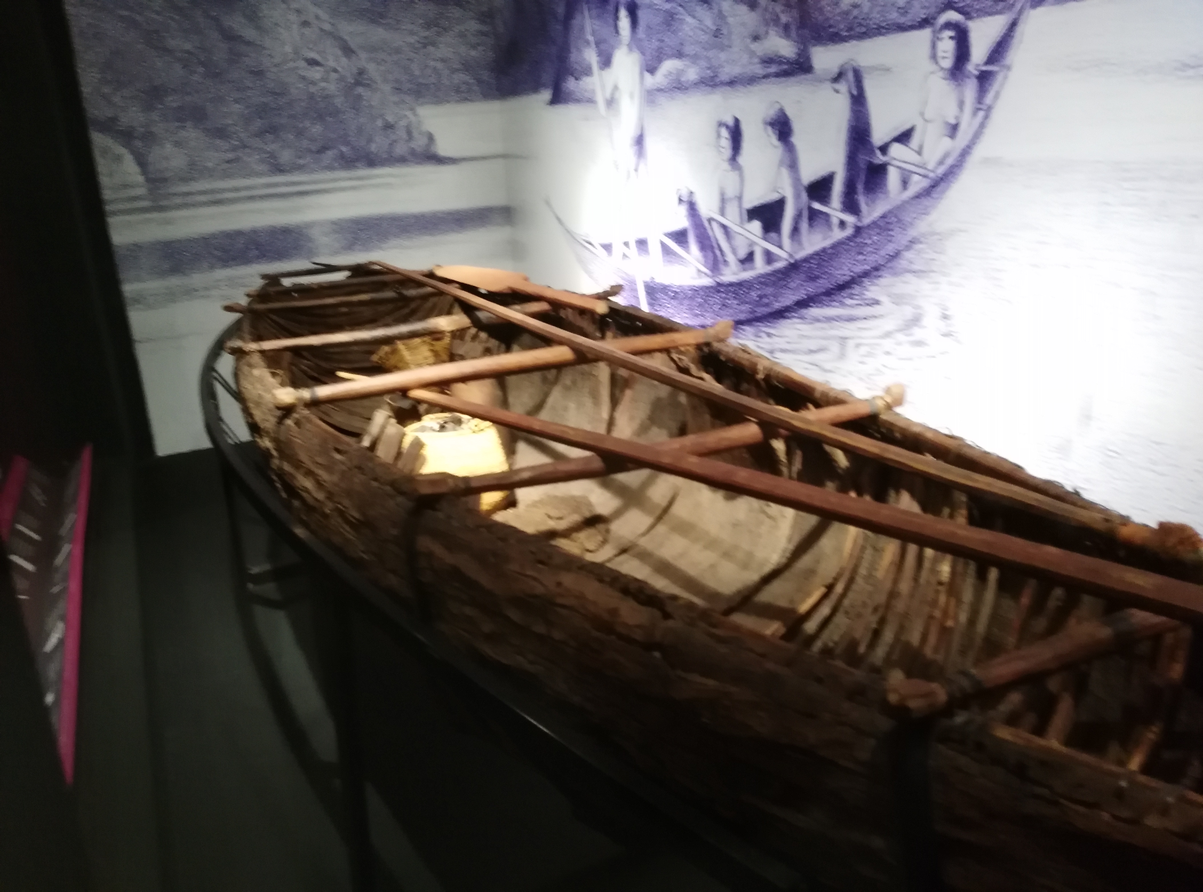 Canoa Kawéskar Parte de la colección del Museo Nacional de Historia Natural, Santiago de Chile.